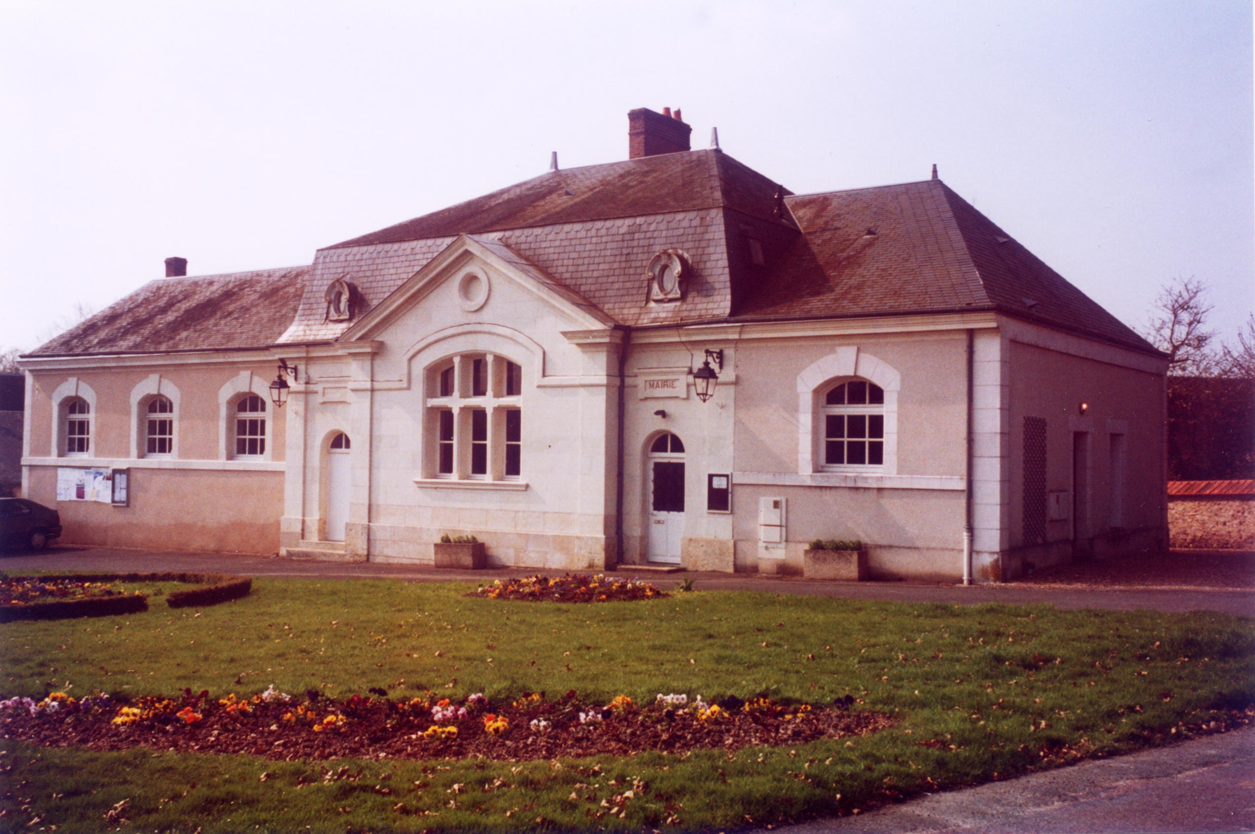 Mairie d'Authon (Loir-et-Cher, France)